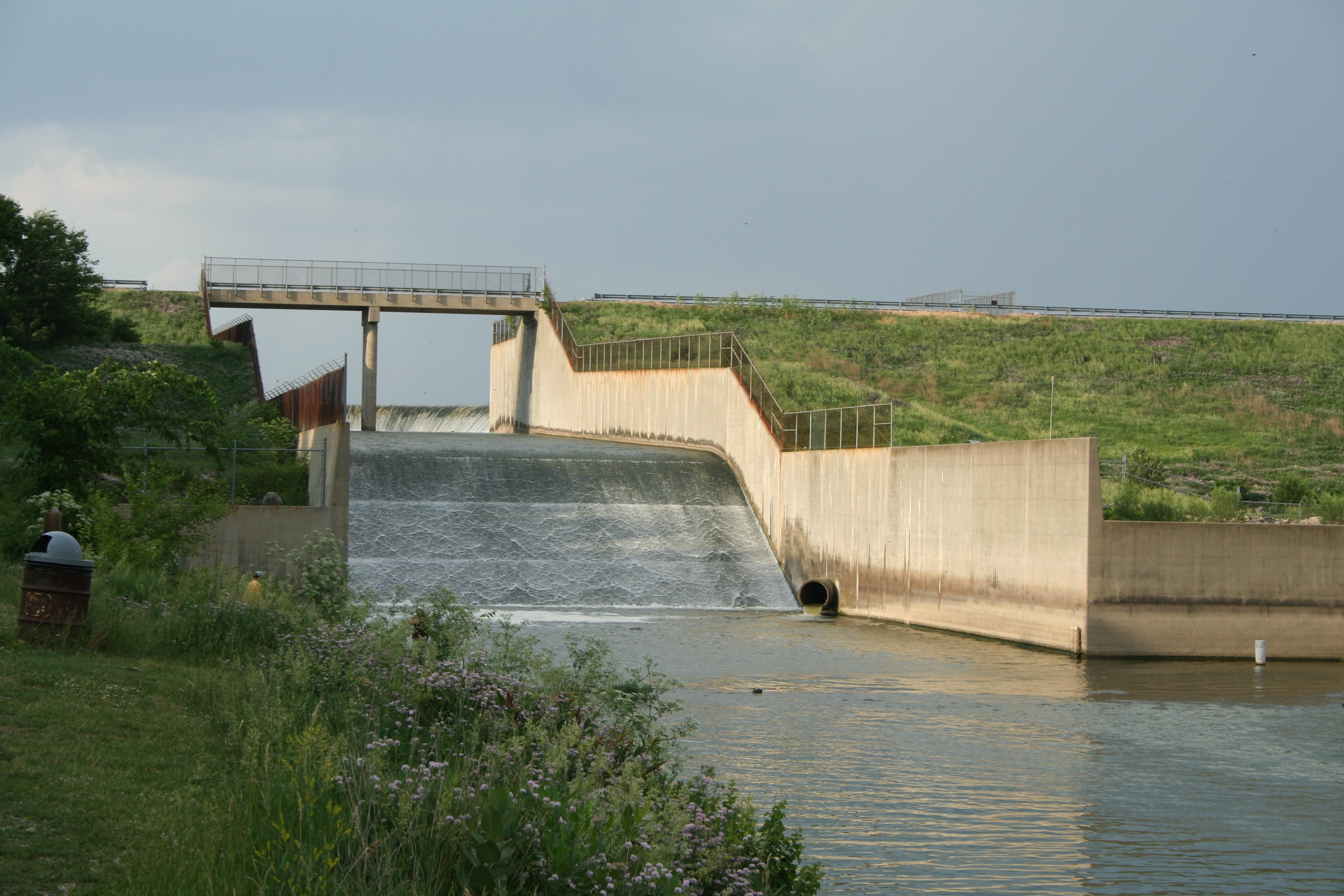 Clinton Lake, Illinois Spillway